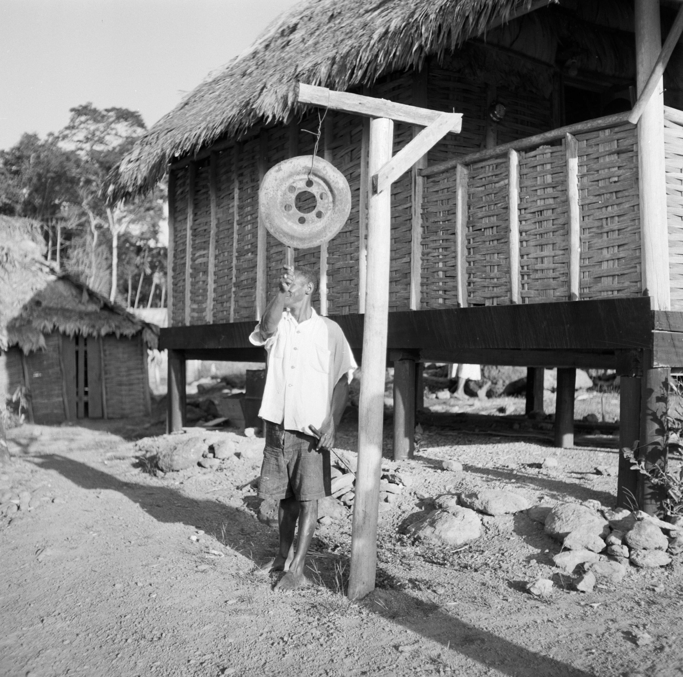 Collectie / Archief : Fotocollectie Van de Poll Reportage / Serie : Nederlandse Antillen en Suriname ten tijde van het koninklijk bezoek van koningin Juliana en prins Bernhard in 1955 Beschrijving : Geïmproviseerde gong in een dorp bij Brokopondo Datum : 1 oktober 1955 Locatie : Brokopondo, Suriname Trefwoorden : inheemse bevolking , woningen Fotograaf : Poll, Willem van de Auteursrechthebbende : Nationaal Archief Materiaalsoort : Negatief (zwart/wit) Nummer archiefinventaris : bekijk toegang 2.24.14.02 Bestanddeelnummer : 252-5143